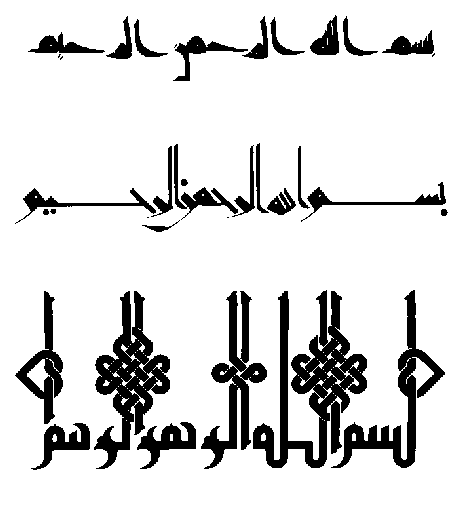 Calligraphy Illustrations bismi-llāhi ar-raħmāni ar-raħīmi بسم الله الرحمن الرحيم